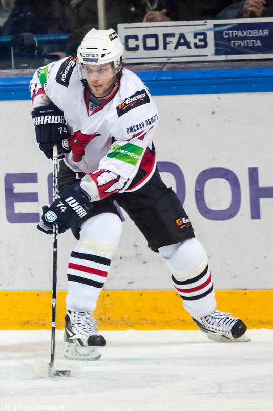 Нападающий Омского Авангарда Костицын Сергей в матче регулярного чемпионата КХЛ 7 января 2013 года против хабаровского Амура.